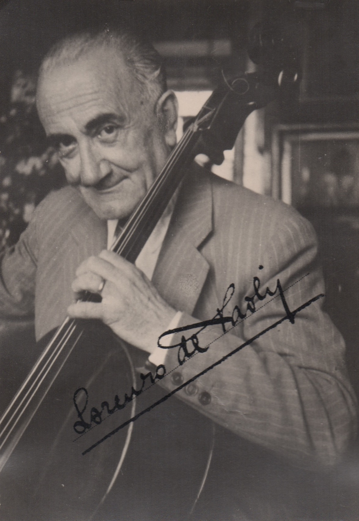 Foto Lorenzo de Paolis